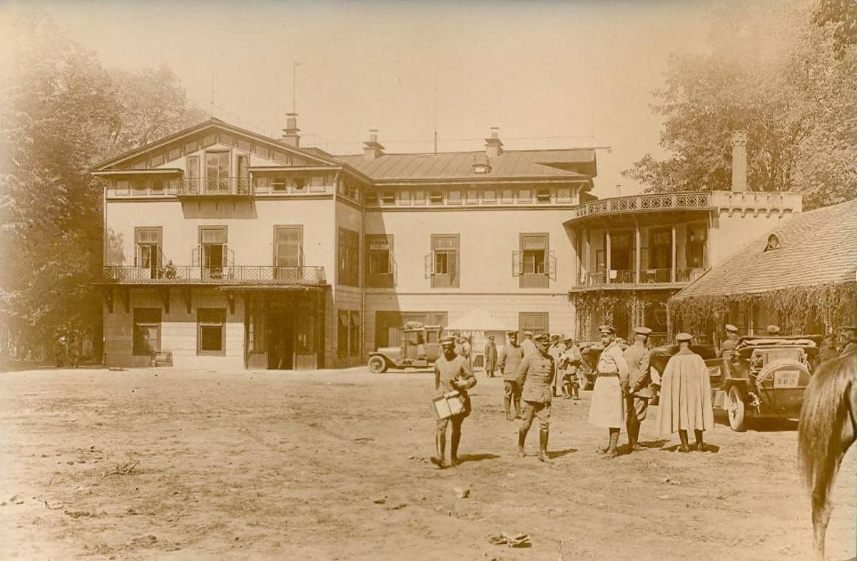 Pałac Lubomirskich w Przeworsku - fot. archiwalna